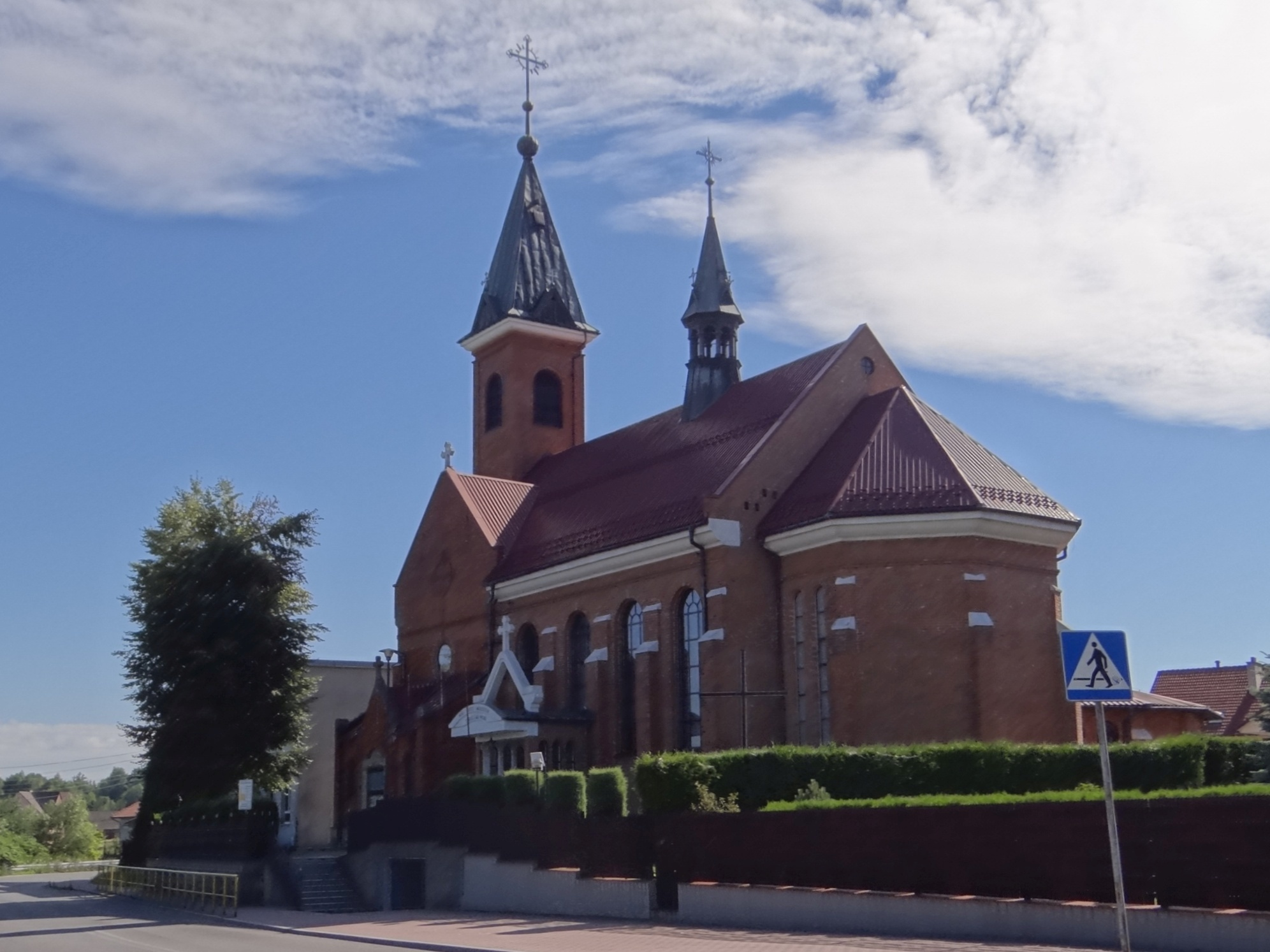 Borzęta 119 - rzymskokatolicki kościół parafialny pw. Niepokalanego Serca NMP